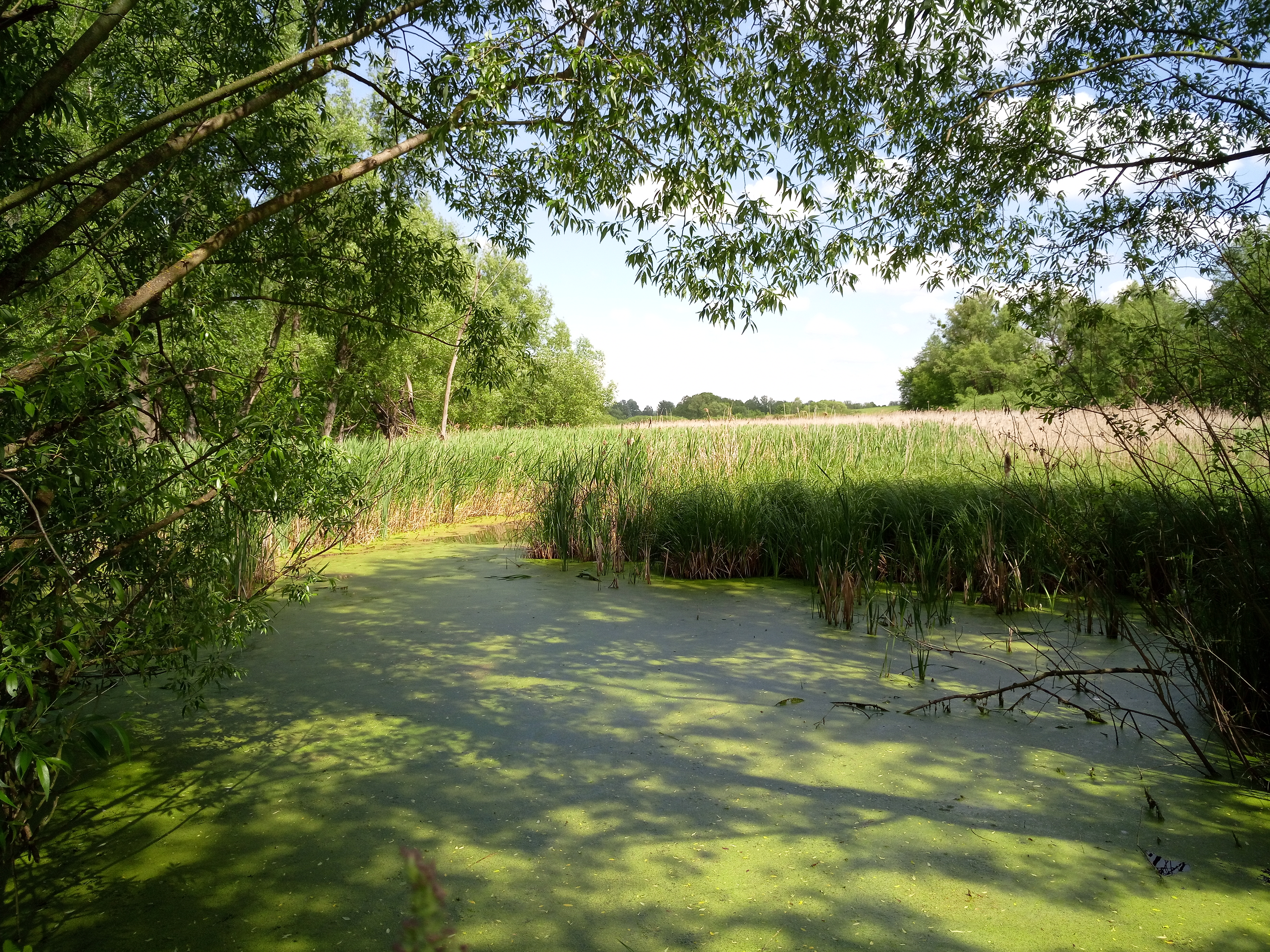 Річка Вербич у межах села Гунчі (2)